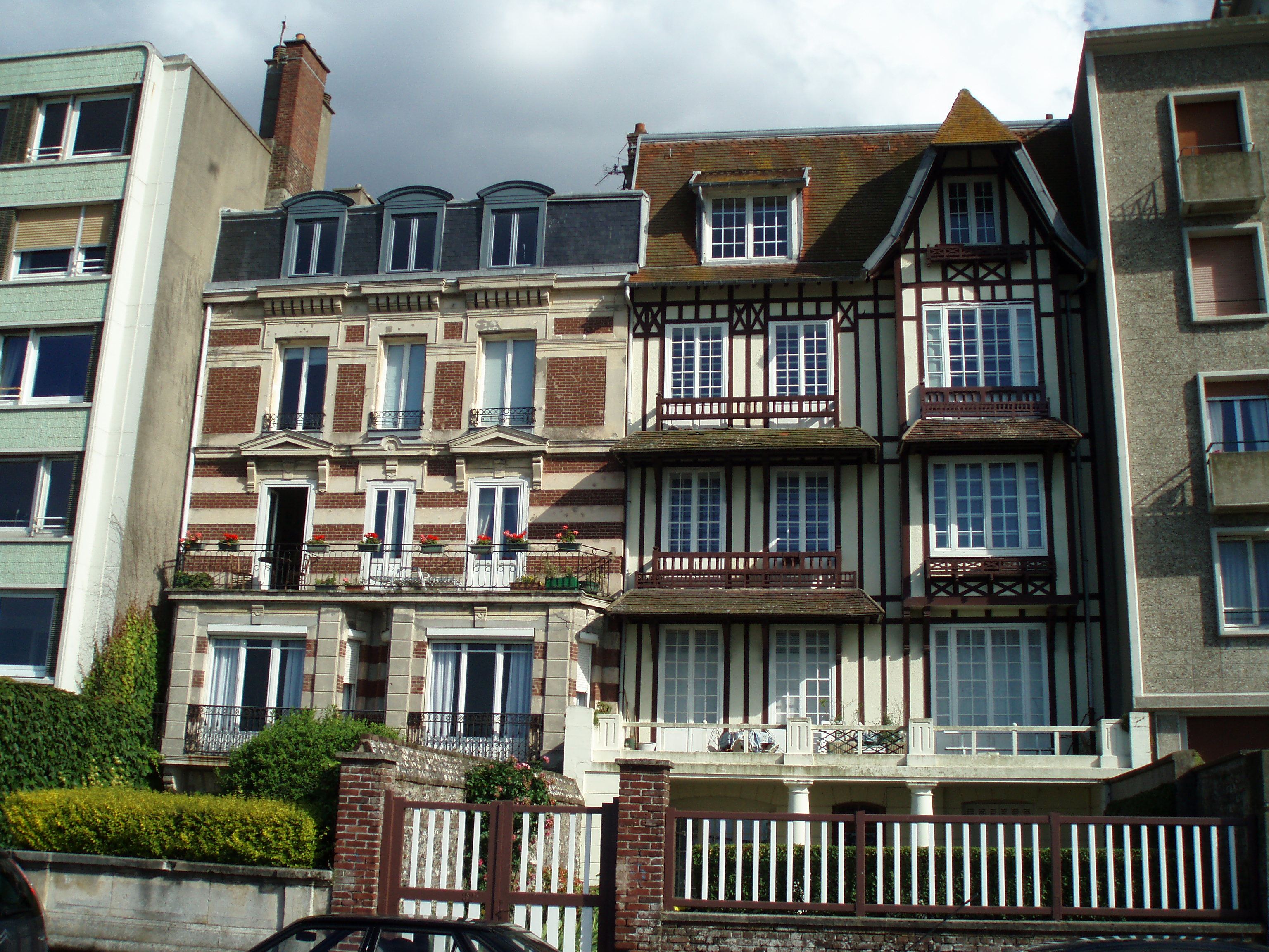 Maisons du front de mer, boulevard de Verdun à Dieppe